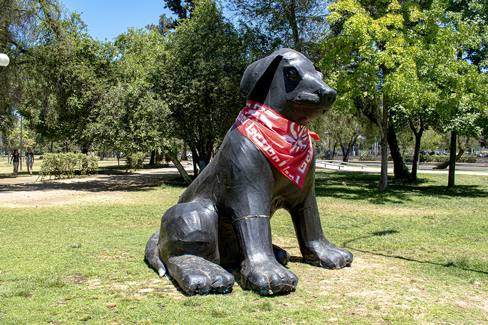 Negro Matapacos en papel maché, Santiago. Representación exhibida en la Plaza a la Aviación.